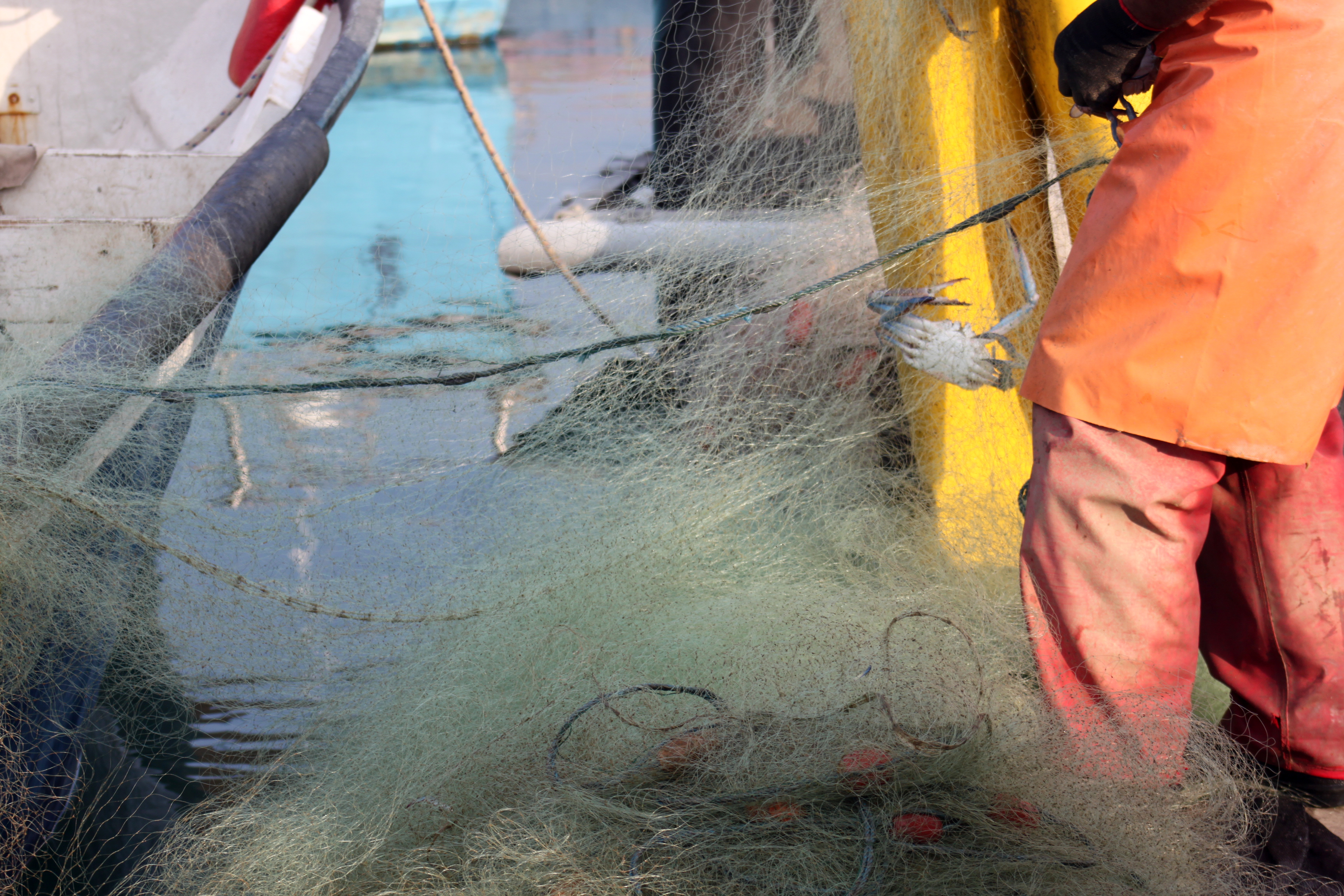 רשת דיג נמל יפו